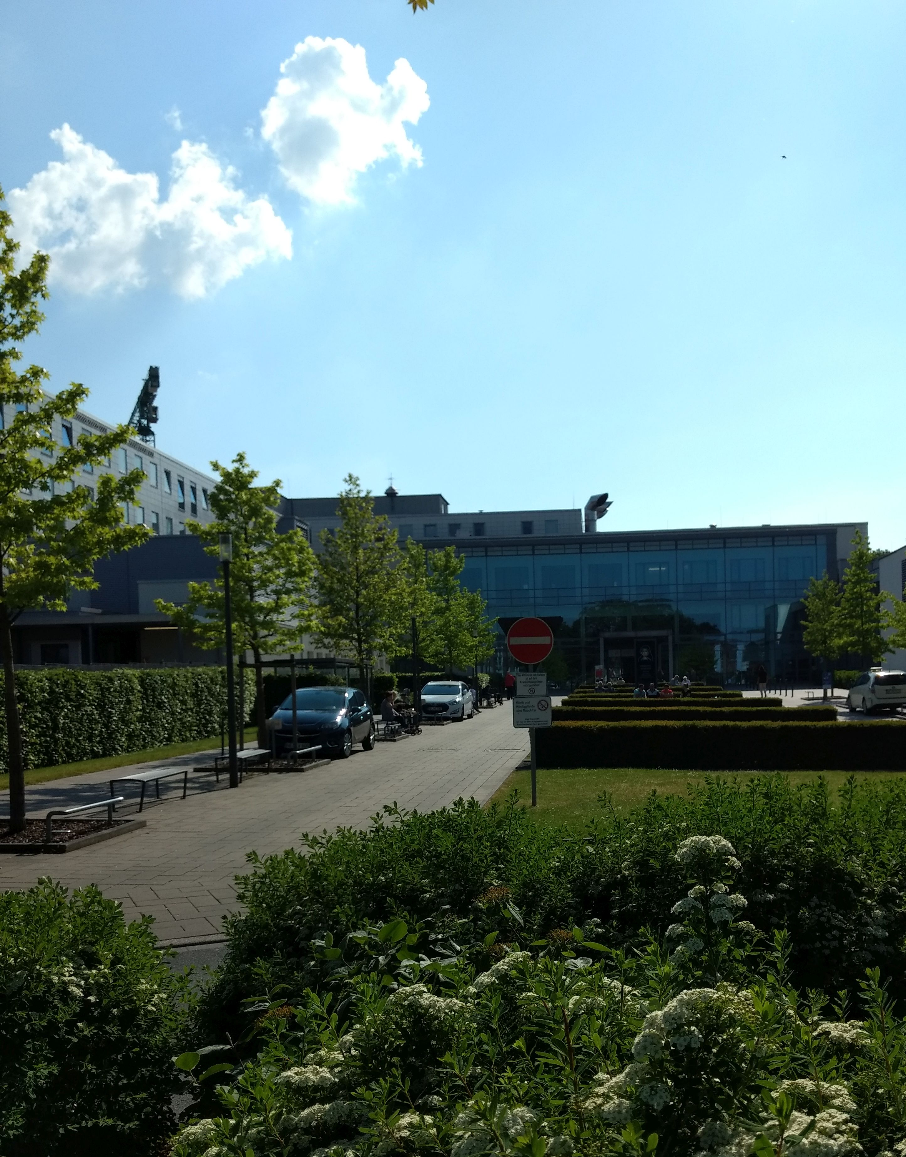 Johanna-Etienne-Krankenhaus Neuss